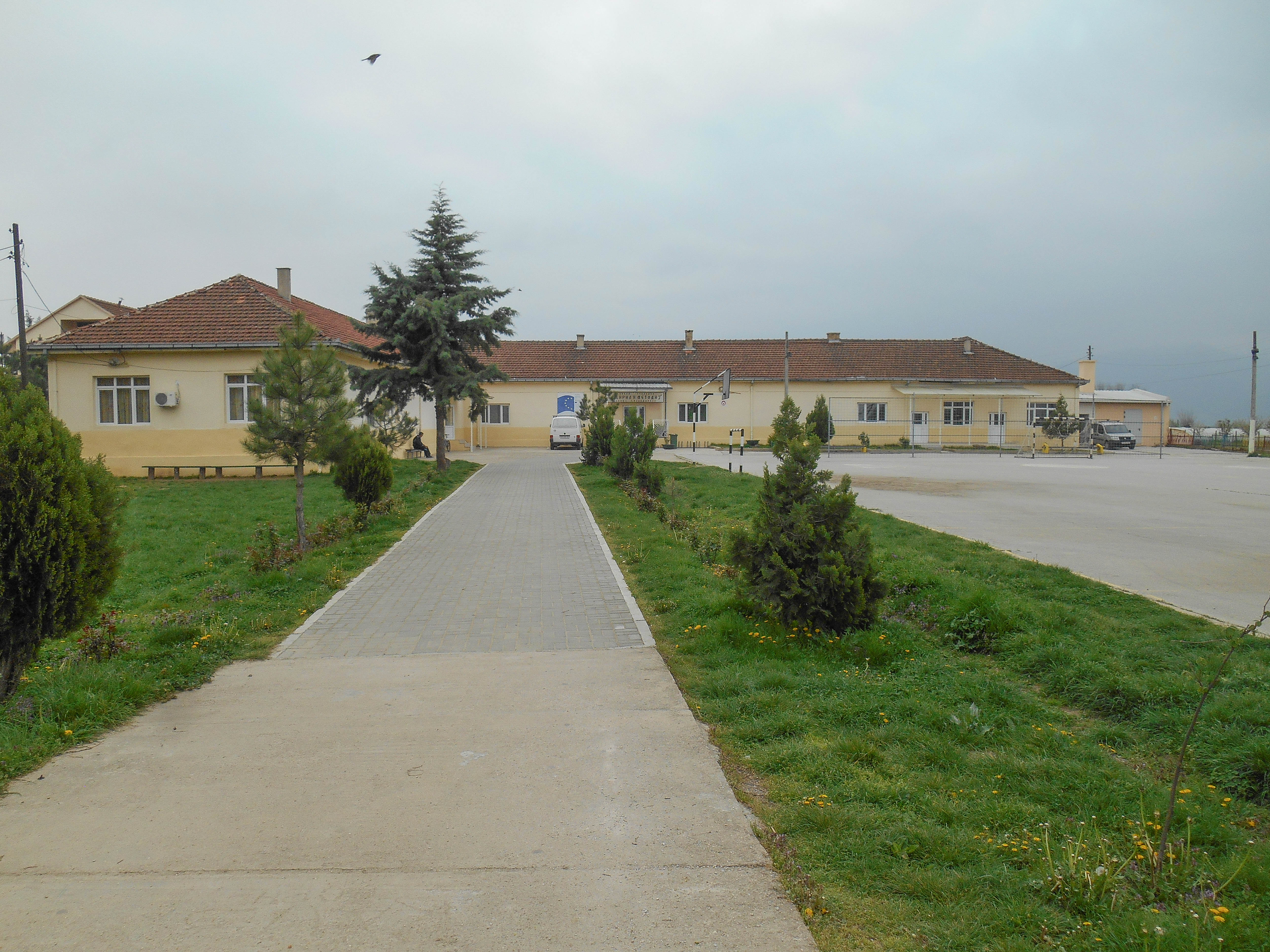 Училиште Св. Кирил и Методиј - Дабиље